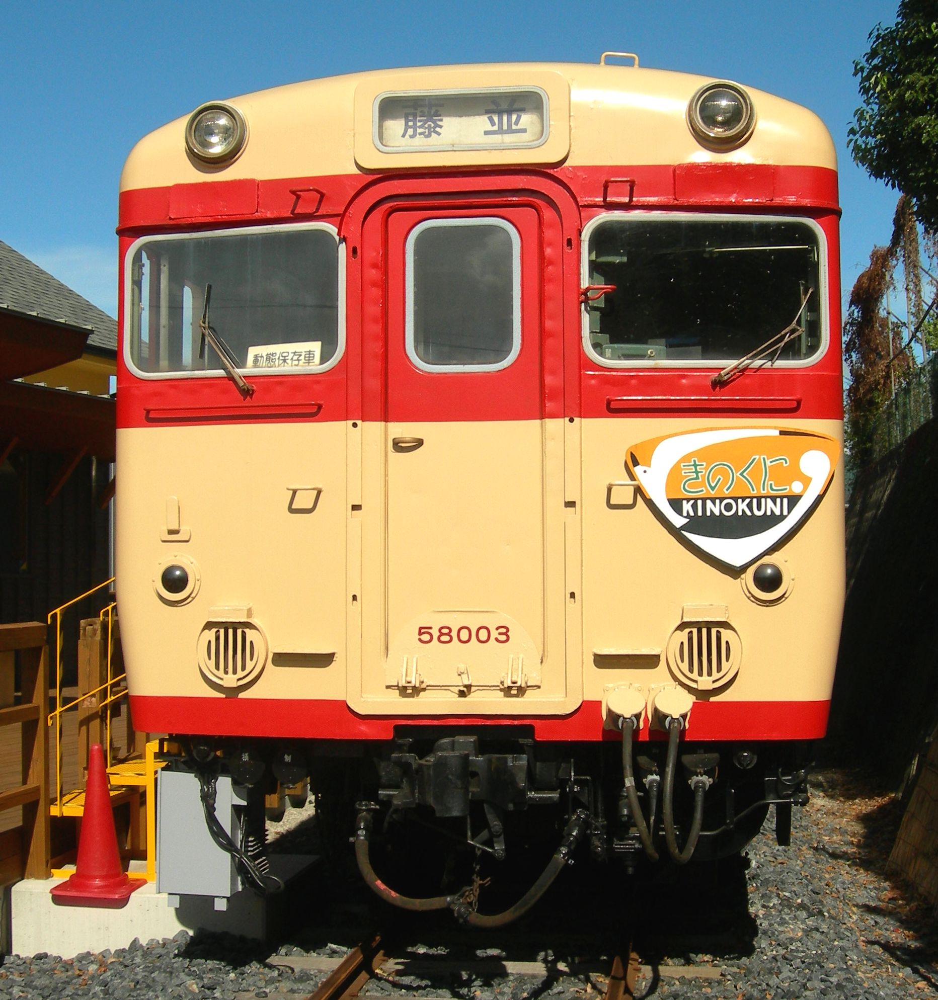 有田鉄道線キハ58003